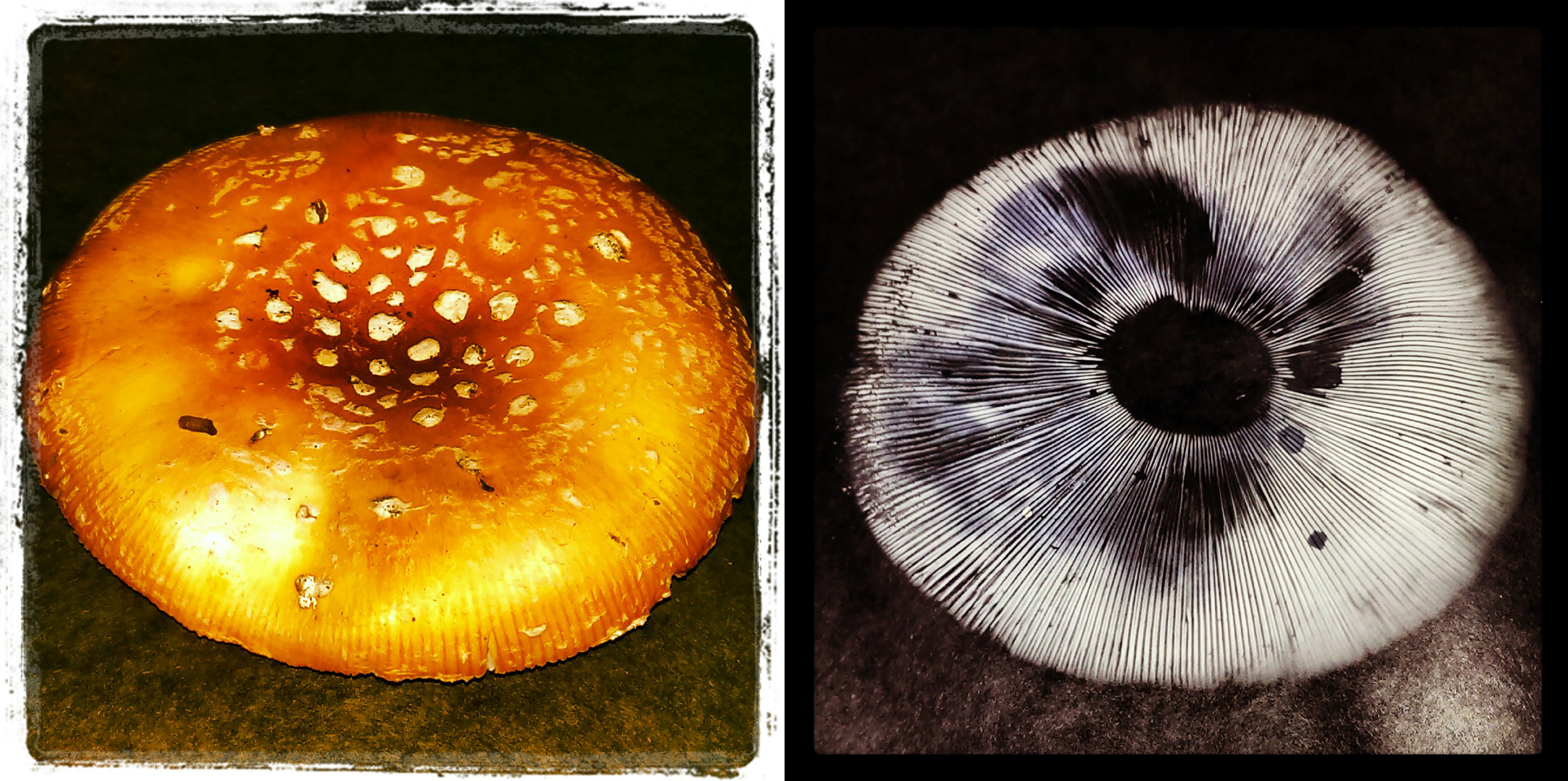 Spore print from a nice fresh Amanita muscaria cap.